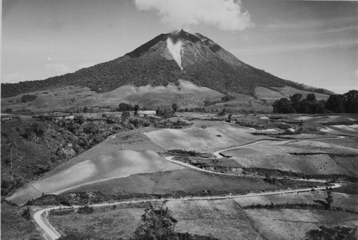 foto. Gezicht op de vulkaan Sinabung